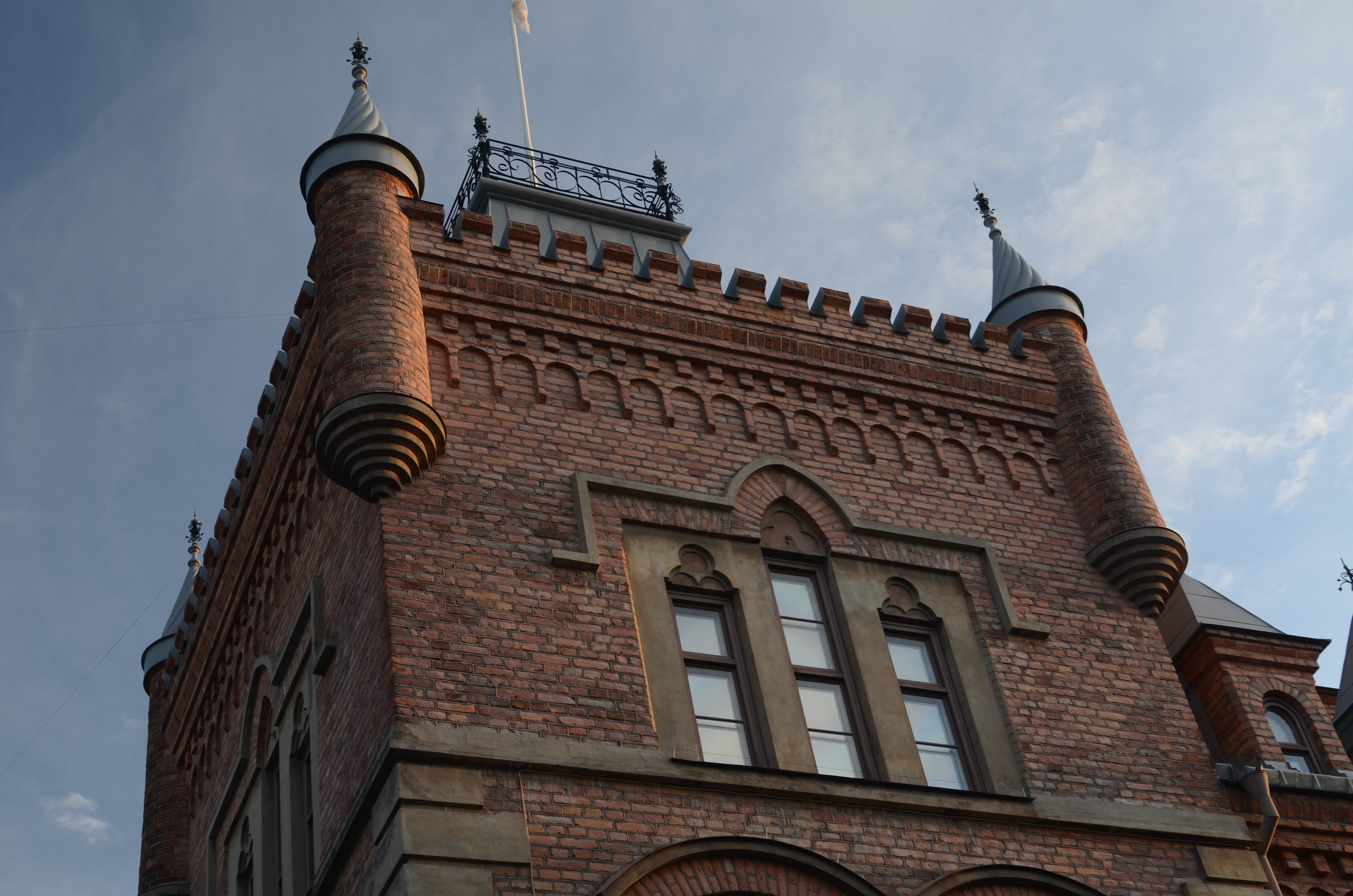 Tornet av Gamla Apotekshuset i Sollefteå (Apotekaren 3, f.d. stadsäga 372) Anläggningsid: 21300000012819